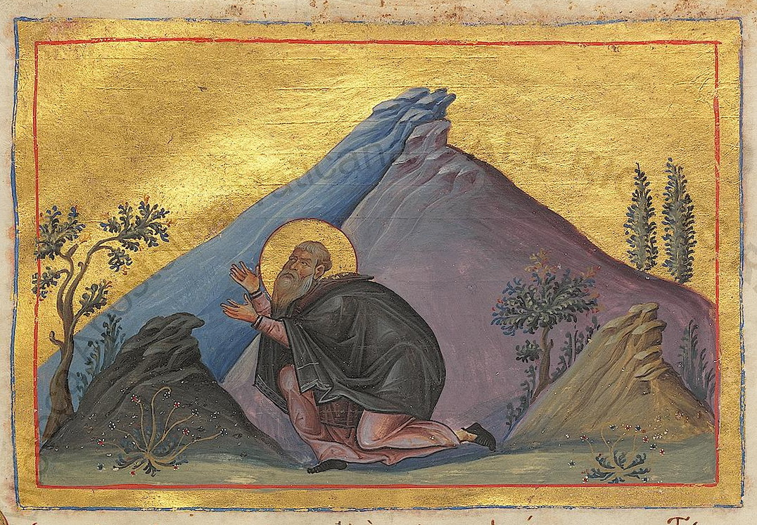 Преподобный Илларион Константинополь. 985 г. Миниатюра Минология Василия II. Ватиканская библиотека. Рим.